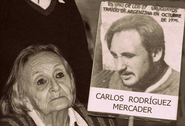 Amalia Mercader solía ir a las manifestaciones en búsqueda de verdad y justicia con la foto de Carlos Alfredo